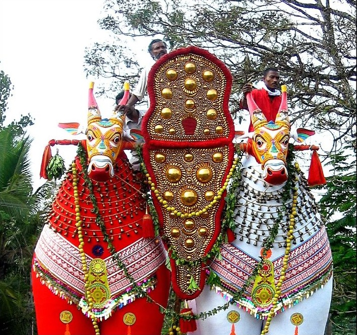 കേരളീയ ജീവിതത്തിന്റെ പ്രസരിപ്പു മുഴുവന് പ്രത്യക്ഷപ്പെടുന്നത് ഉത്സവങ്ങളിലാണ്. സാമൂഹികമായ കൂട്ടായ്മയുടെ ആവിഷ്കാരങ്ങളായ ഒട്ടേറെ ഉത്സവങ്ങളുണ്ട്. മിക്ക കലകളും വളര്ന്നു വികസിച്ചതും ആവിഷ്കരിക്കപ്പെടുന്നതും ഉത്സവങ്ങളോടനുബന്ധിച്ചാണ്. കഴിഞ്ഞ മാസം നടന്ന കേരളത്തിലെ പന്തളം മഹാദേവര് ക്ഷേത്രത്തിലെ കെട്ടുക്കാഴ്ച് ഉത്സവത്തില് നിന്നുള്ള ഒരു ദൃശ്യം.പന്തളത്തെ കുളനട, പനങ്ങാട്, തോന്നല്ലൂര്, കുരമ്പാല, കടയ്ക്കാട് മുതലായ കരകളില് നിന്നും കാളകളെ വര്ണ്ണാഭമായ നിറങ്ങളില് കെട്ടിയൊരുക്കി മഹാദേവര് ക്ഷേത്രത്തില് കൊണ്ടു വന്ന് എഴുന്നള്ളിക്കുന്നു... The true social spirit of the so called God's own country - Kerala,India is in it's festivals.This is the time when people unite in their true spirit irrespective of religion,caste,creed,politics,etc. Many of the artforms have been developed and preserved as part of these festivals.These colorfully decorated structures that symbolises the bull is from one of the festivals at the Mahadevar Temple , Pandalam, Kerala , India.